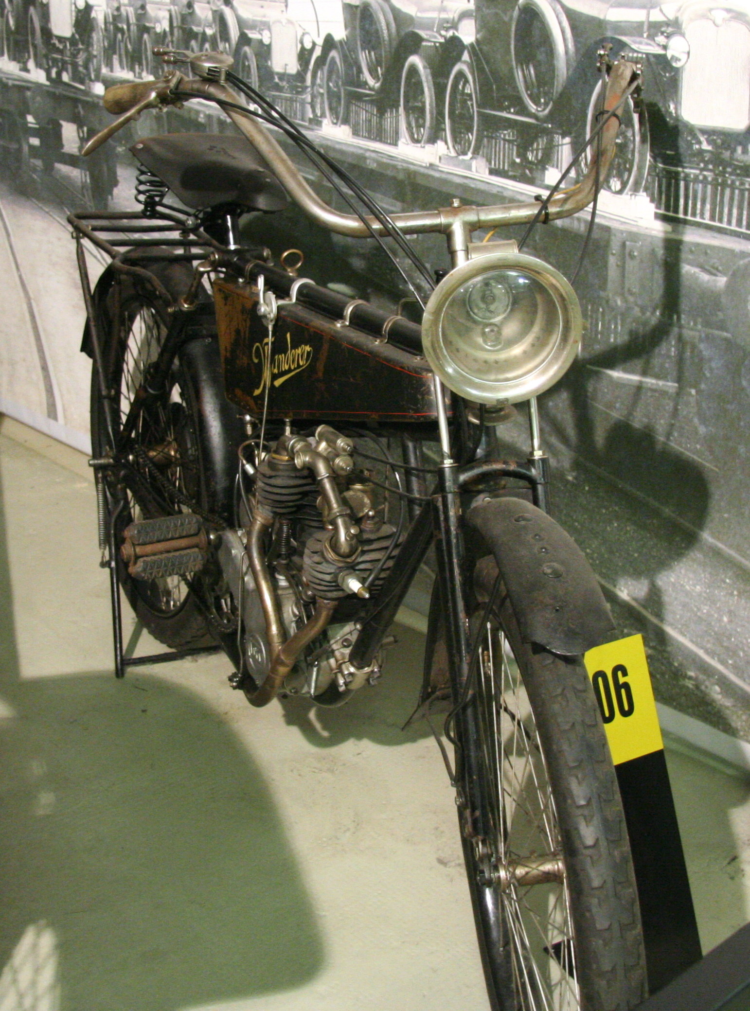 Wanderer 3PS, 2-Zylinder V-Motor, 408 cm³, Höchstgeschwindigkeit 65 km/h, Hinterradfederung, Gewicht 65 kg, Baujahr 1910 im Museum für sächsische Fahrzeuge in Chemnitz.